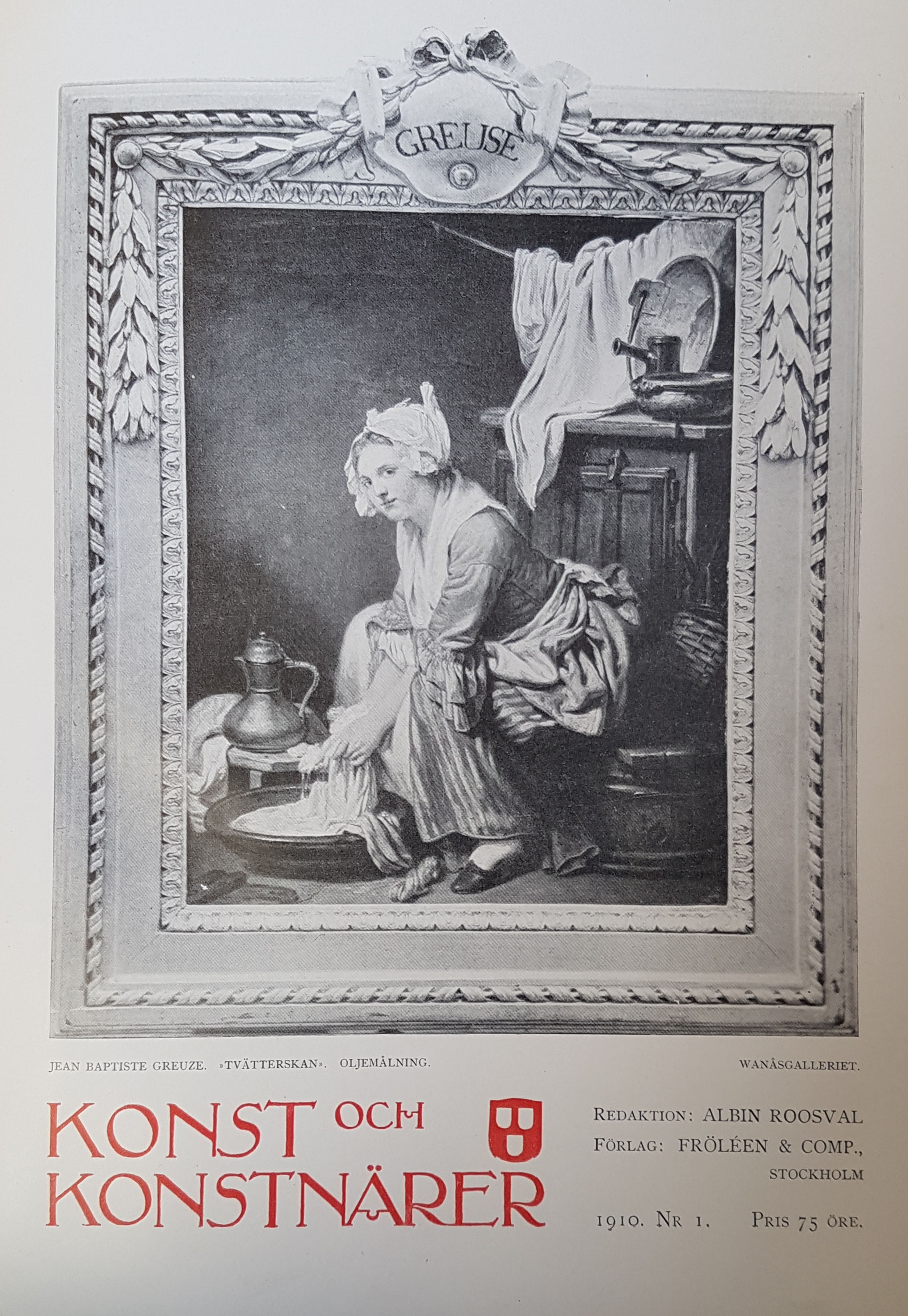 Titelsida till första numret av Konst och Konstnärer 1910